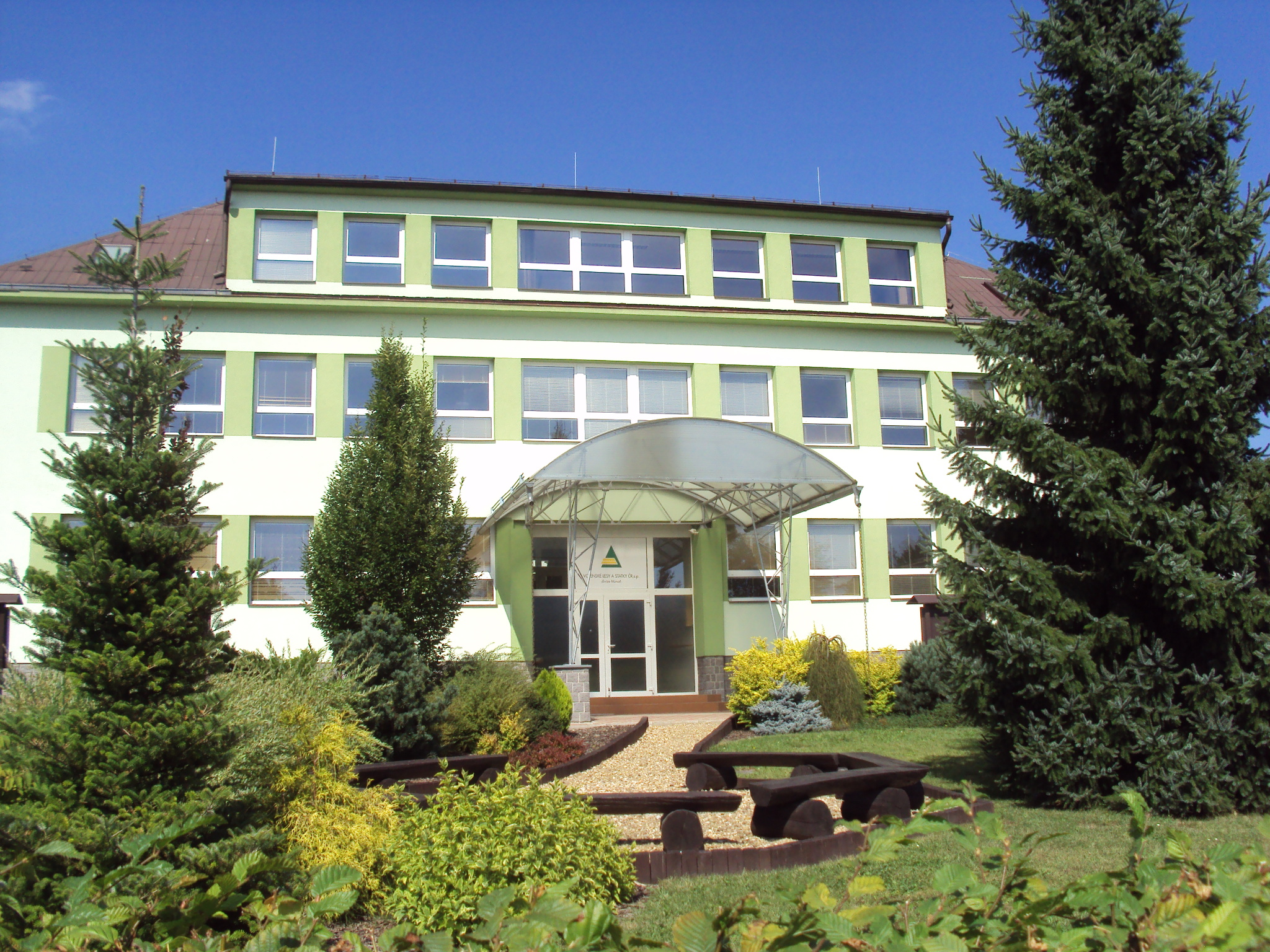 Pobočka Vojenských lesů v Mimoni V. u křižovatky